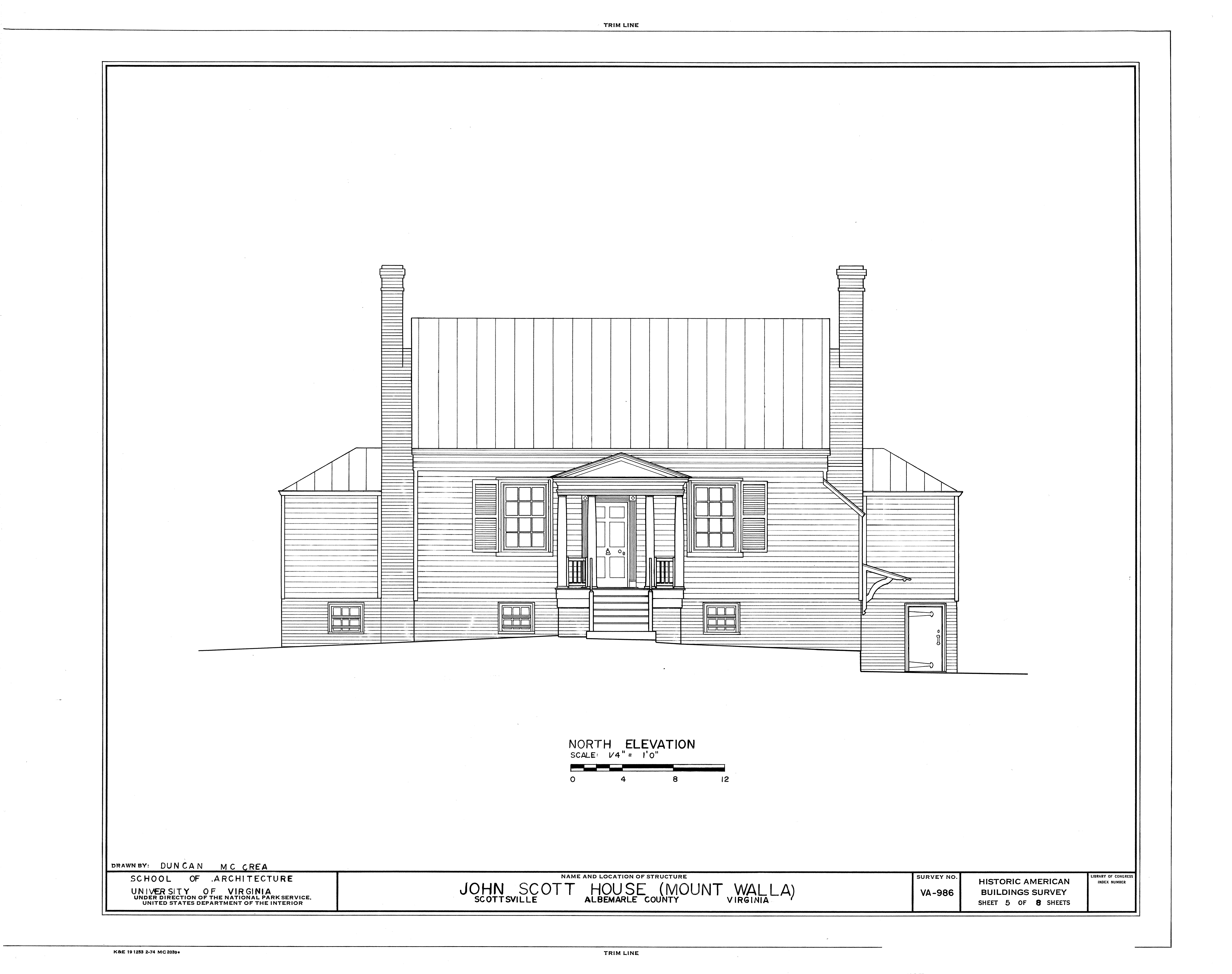 Jefferson, Peter Field